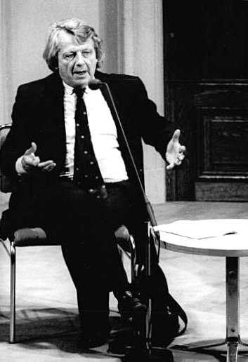 ADN-Uhlemann-25.6.90-Berlin: Lesung Wolfgang Leonhard stellte an der Akademie der Künste sein neuestes Buch "Die Revolution entläßt ihre Kinder" (Band 1) vor. In ihm vollzieht der Autor Beginn und Verlauf seines Erkenntnisprozesses seit Ende der 40er Jahre nach, an dessen Ende der Bruch mit dem Stalinismus stand.